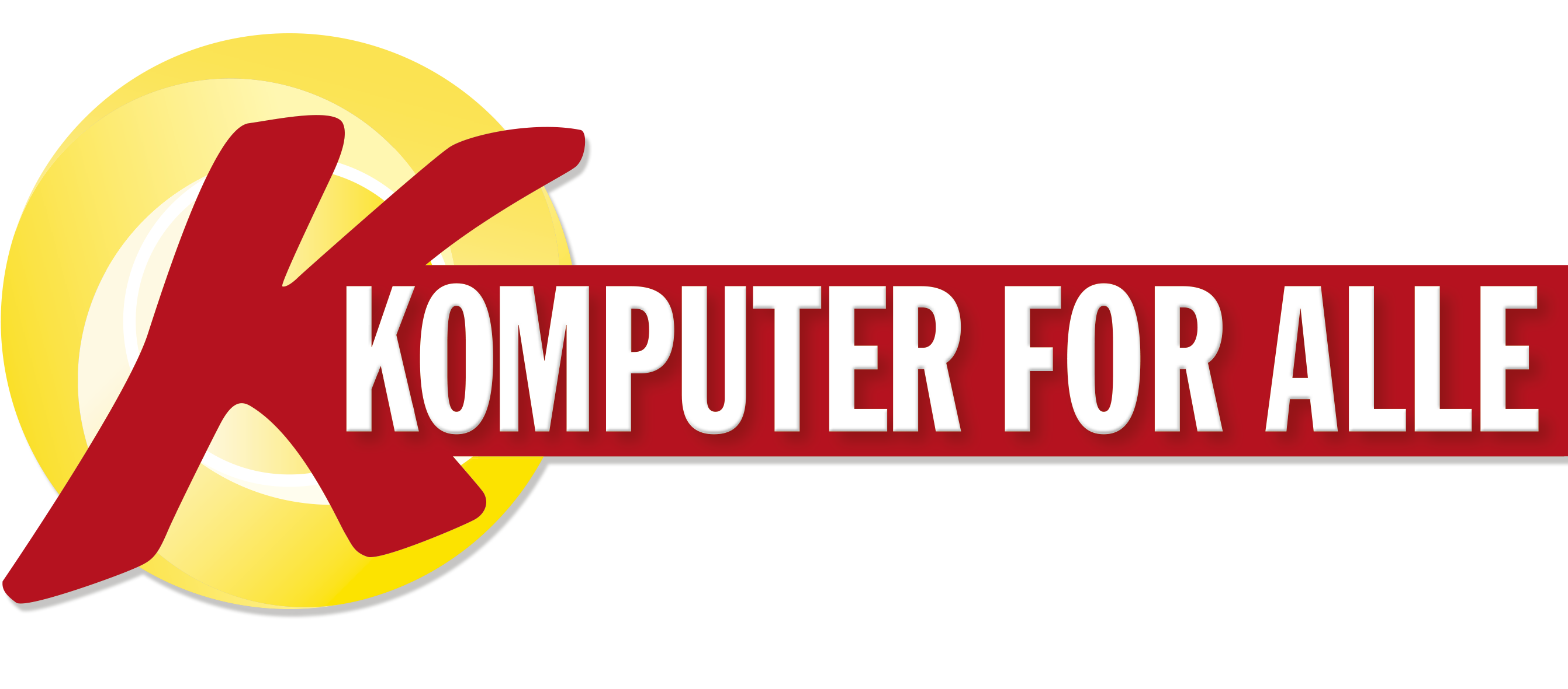 Komputer for alles bladhoved.